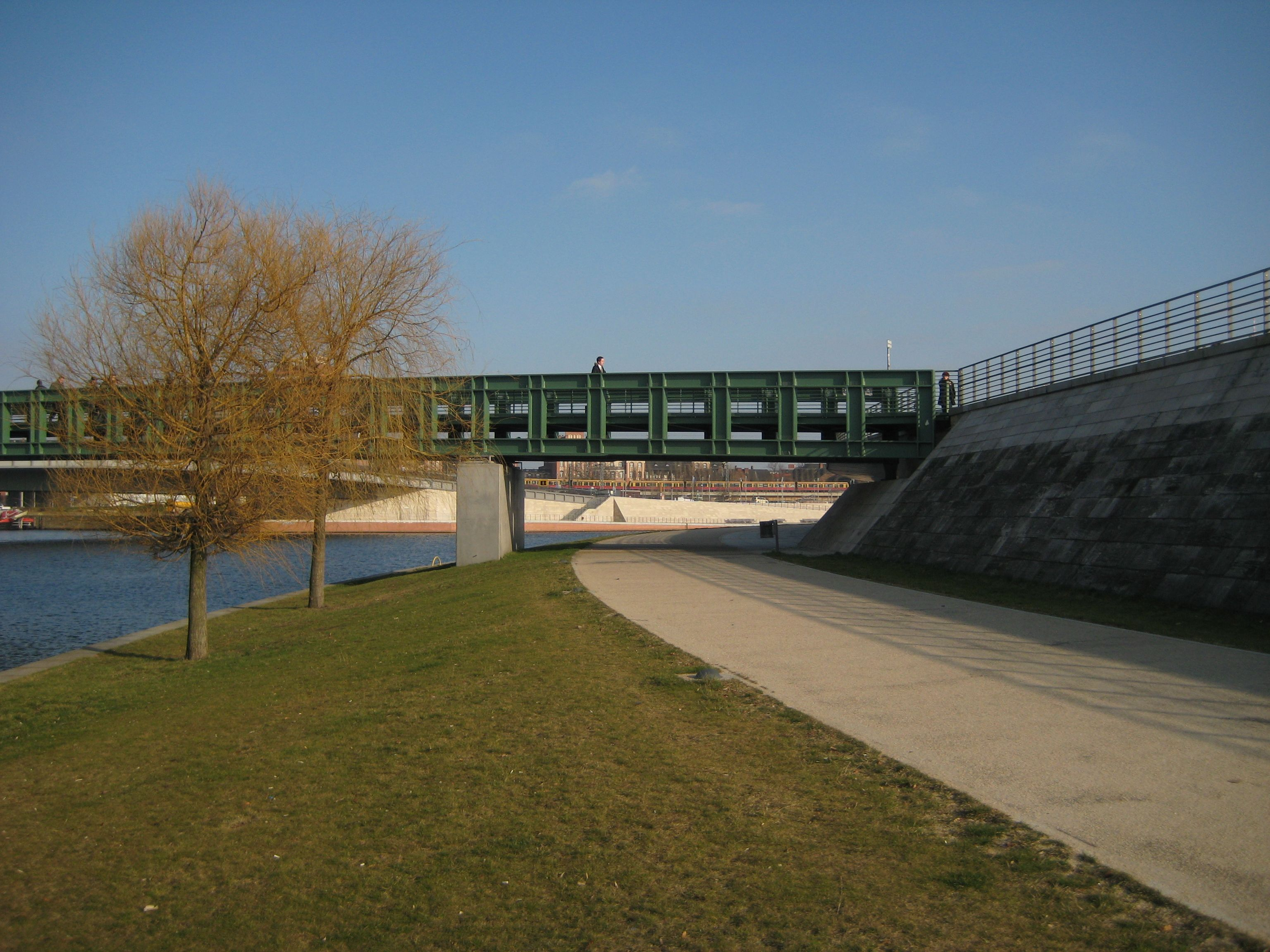 Spreebogenpark in Berlin, riverside promenade with Gustav-Heinemann-Brücke